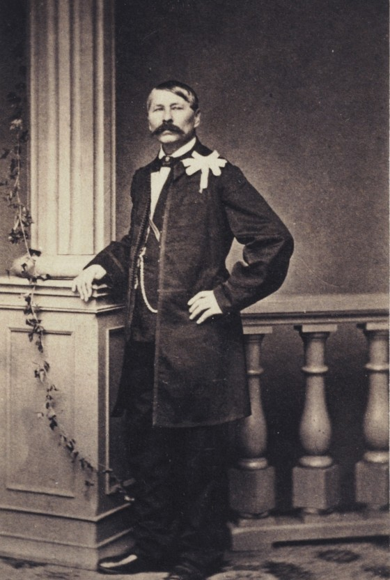 Dionizy Czachowski